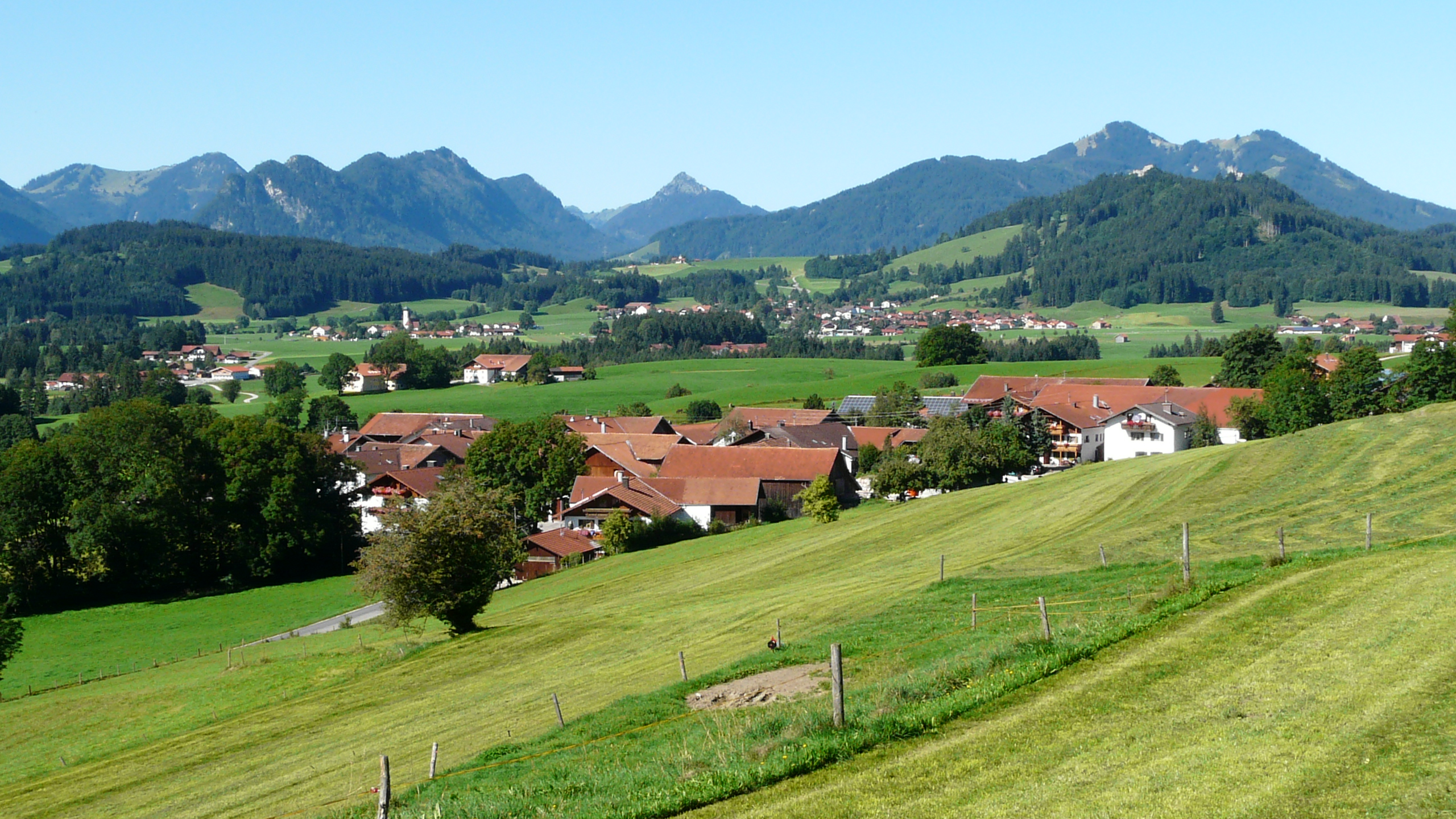 Heimen von Nordosten, Hopferau